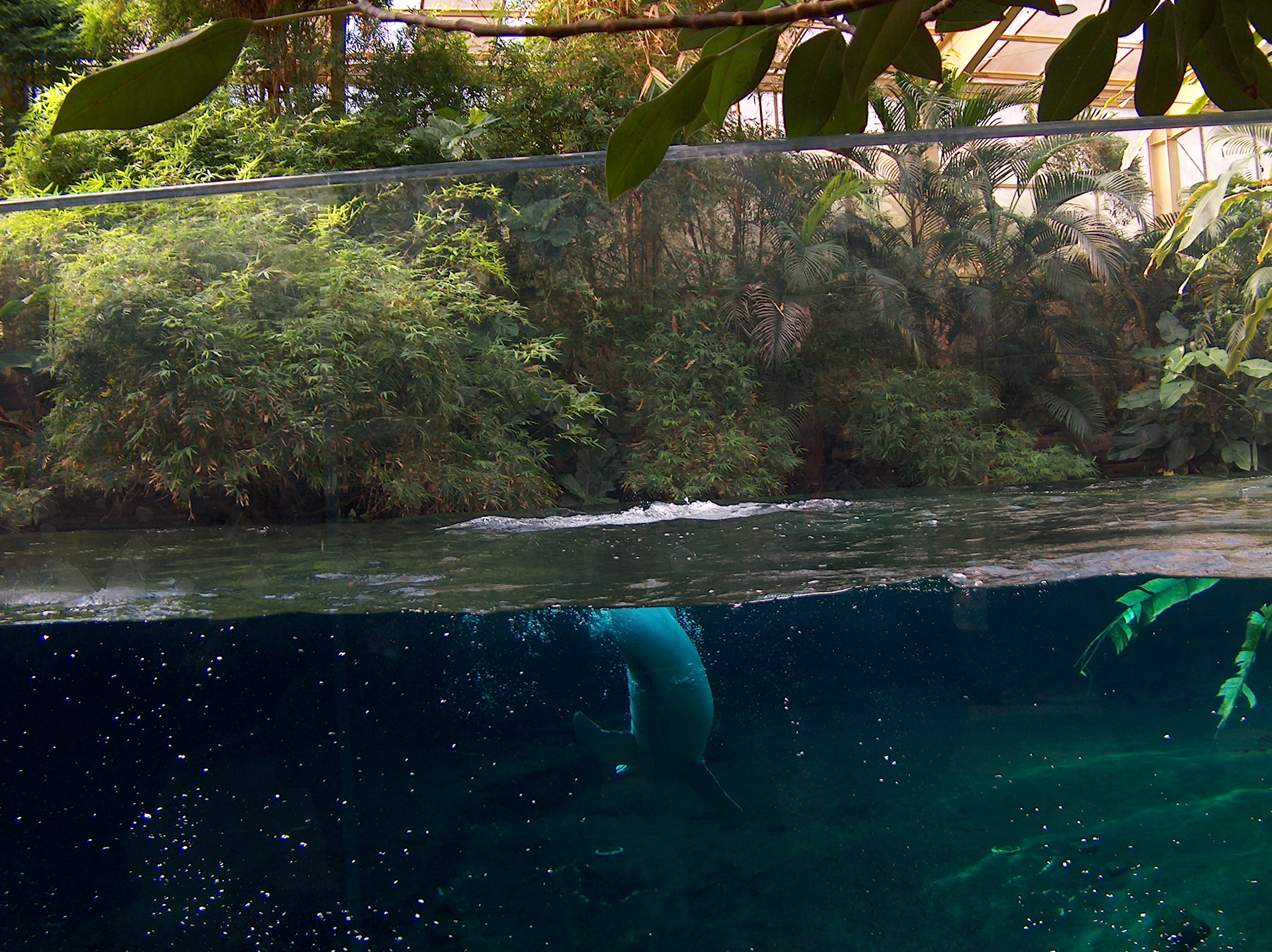 Amazonas-Flussdelfin: Orinoko nach sprund aus dem Wasser im Zoo Duisburg